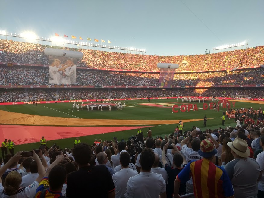 Prèvia del partit de la final que enfrontà al València i el Barça.